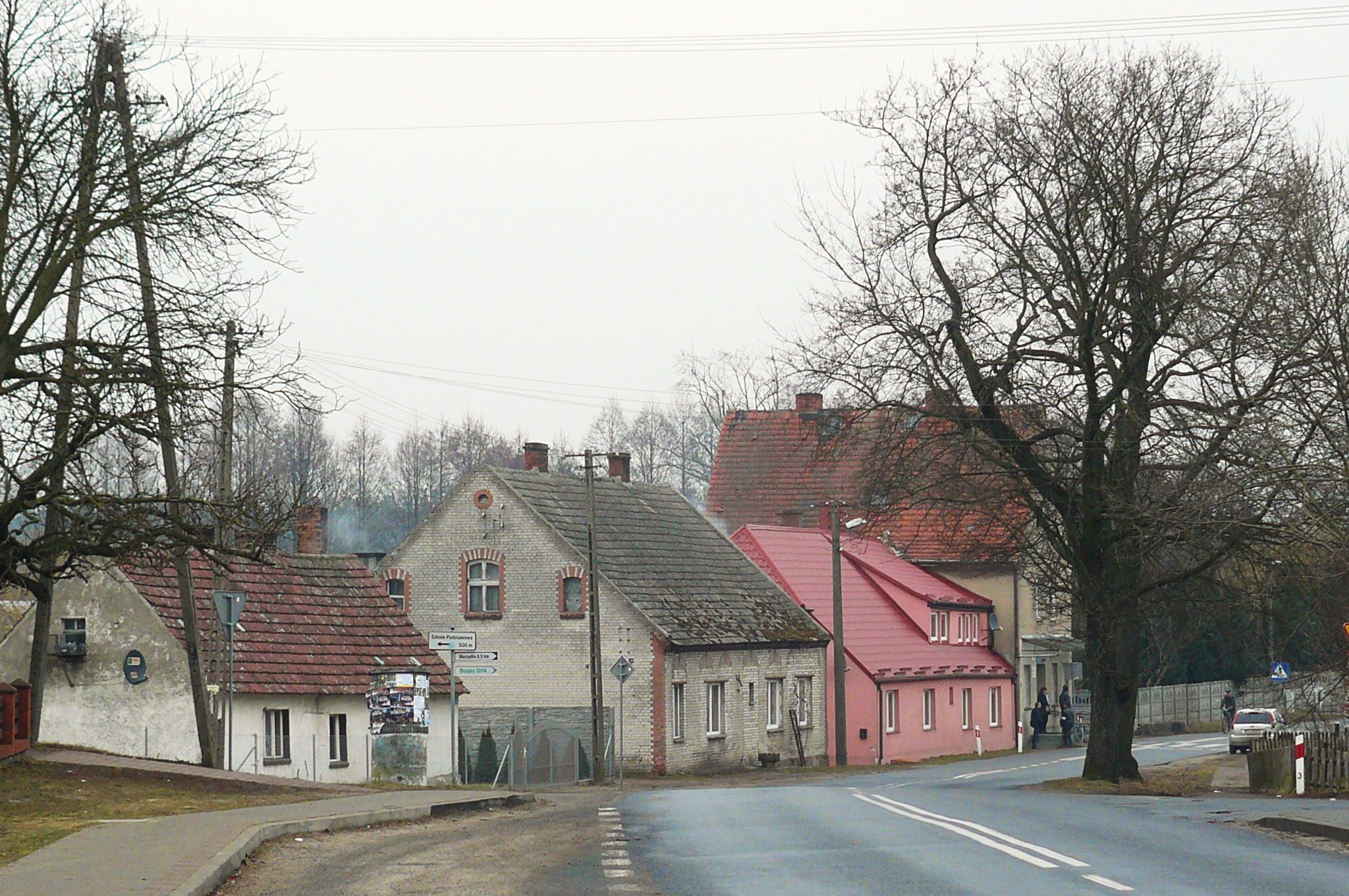 Chełst - widok na dolinę Miały.